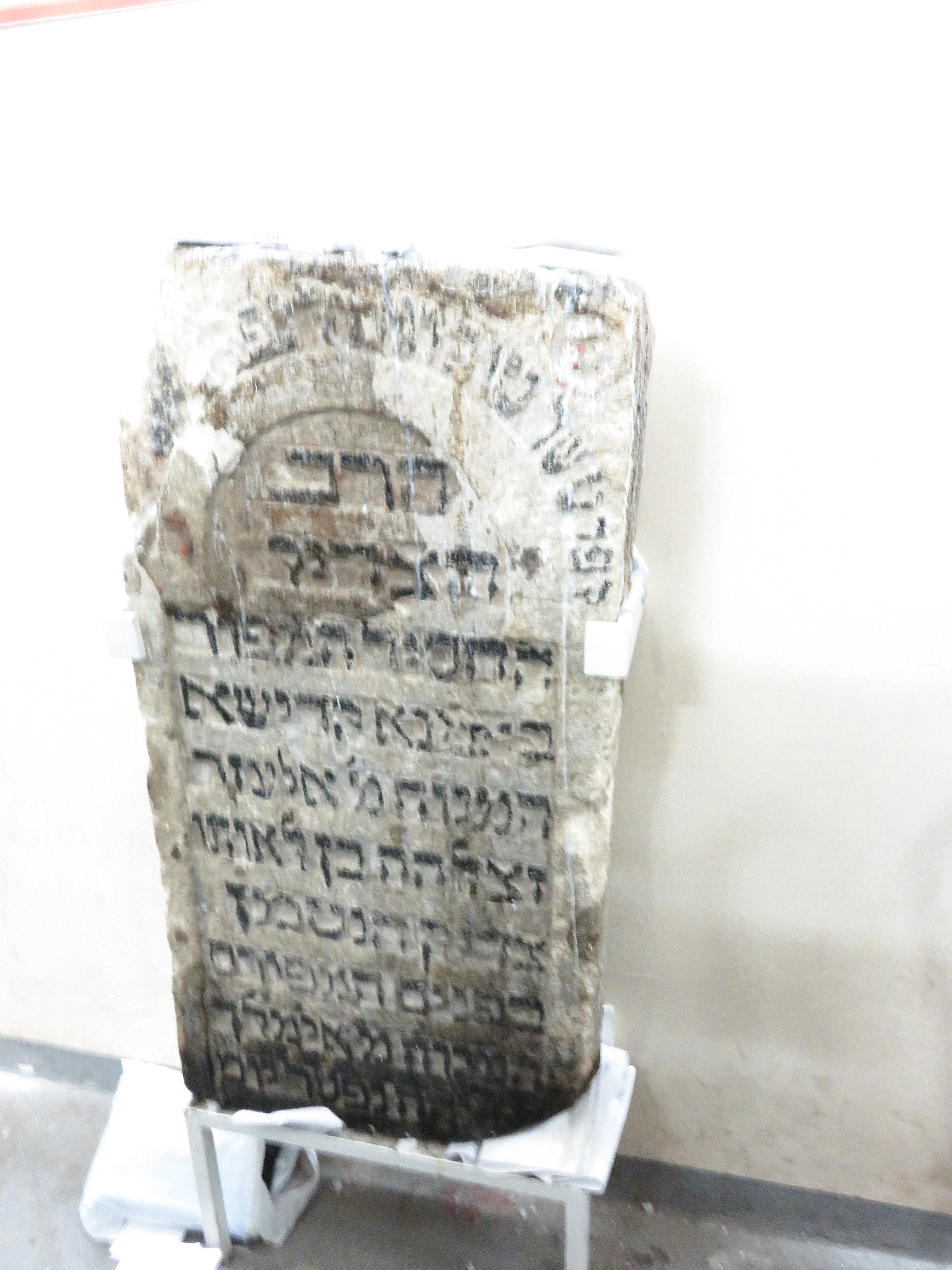 מצבת רבי אלעזר וייסבלום, מוצגת באוהל אביו - ה"נועם אלימלך", ליז'נסק.jpg